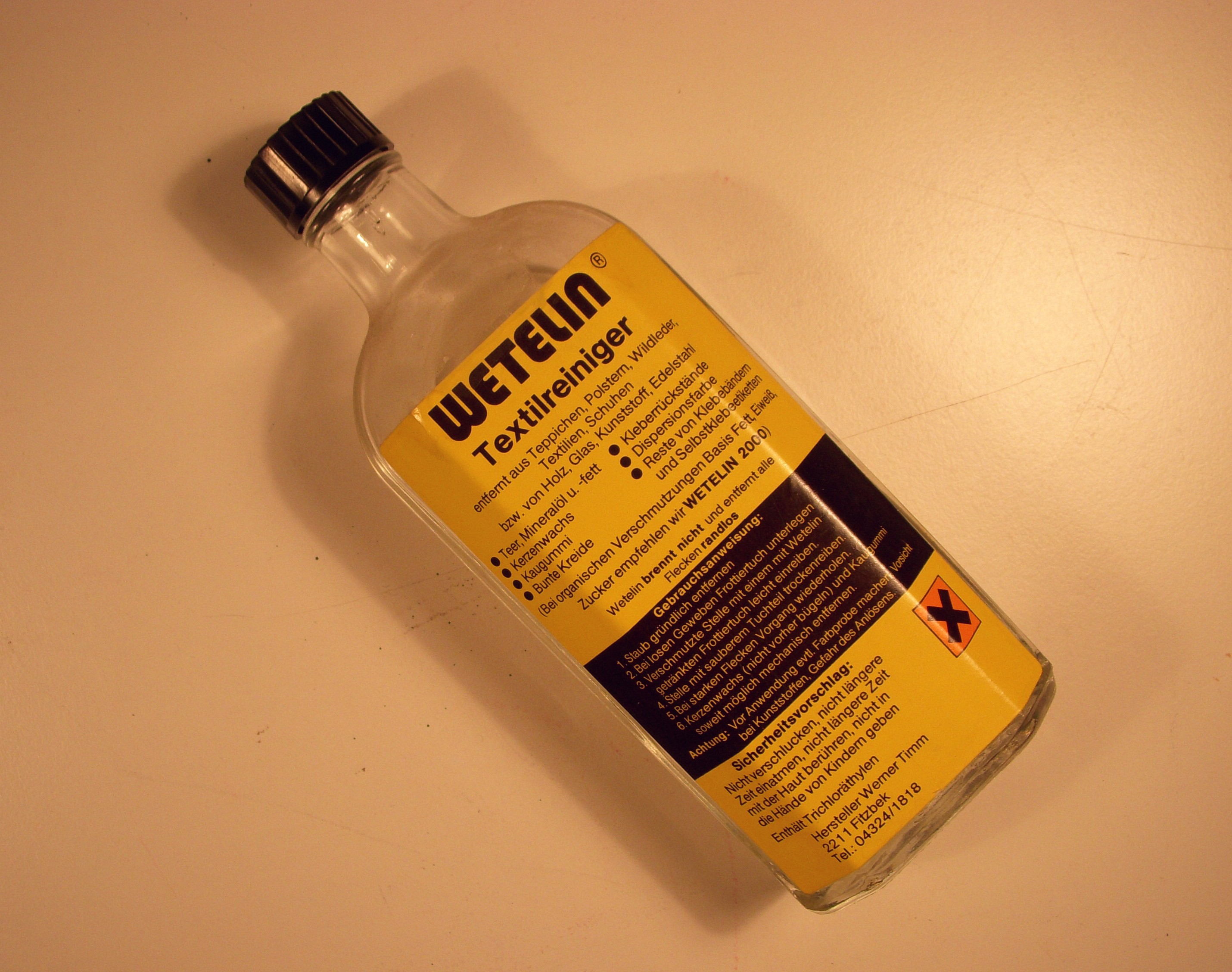 Fläckborttagningsmedel